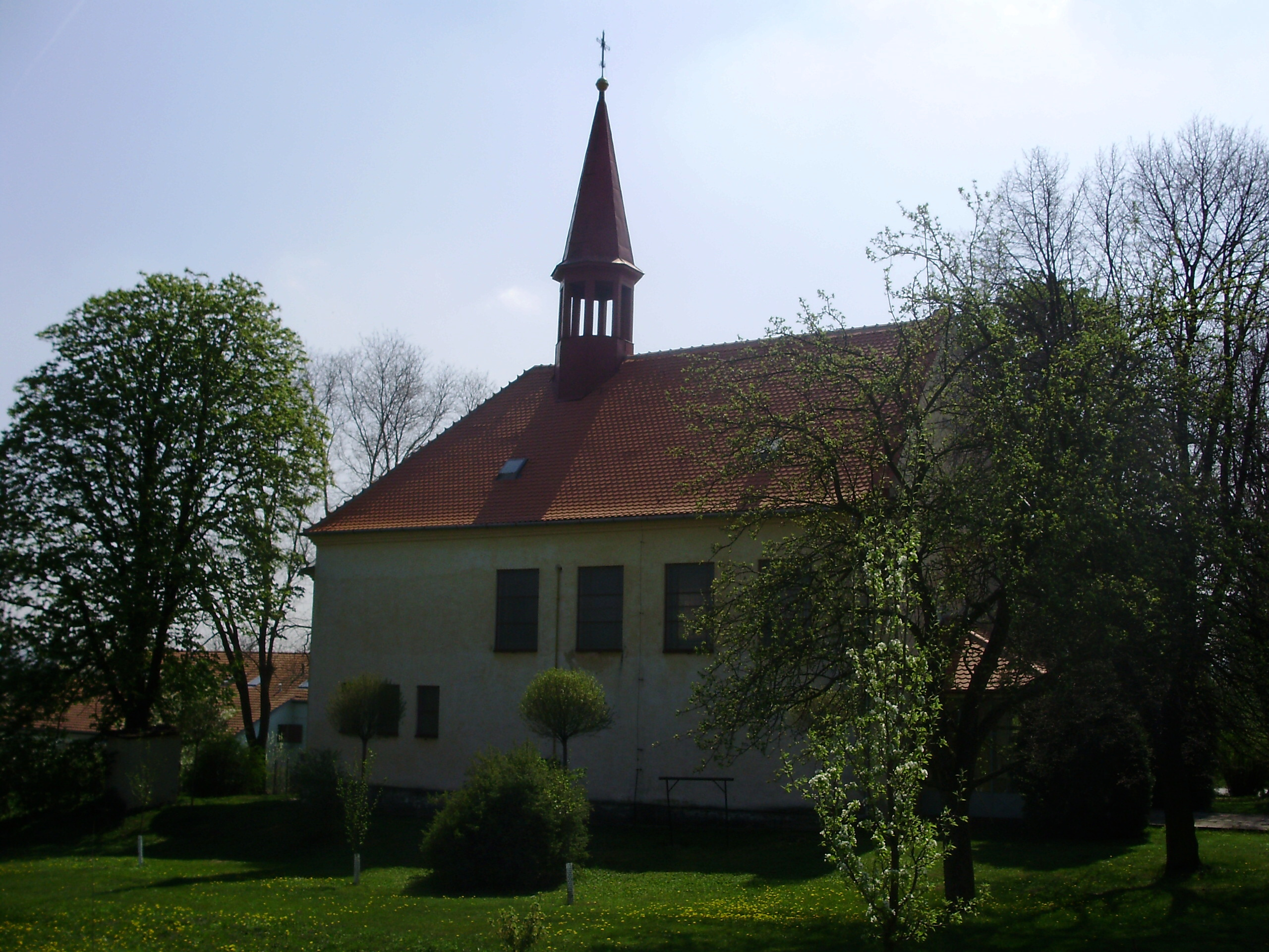 Kostelík Koválovice-Osíčany